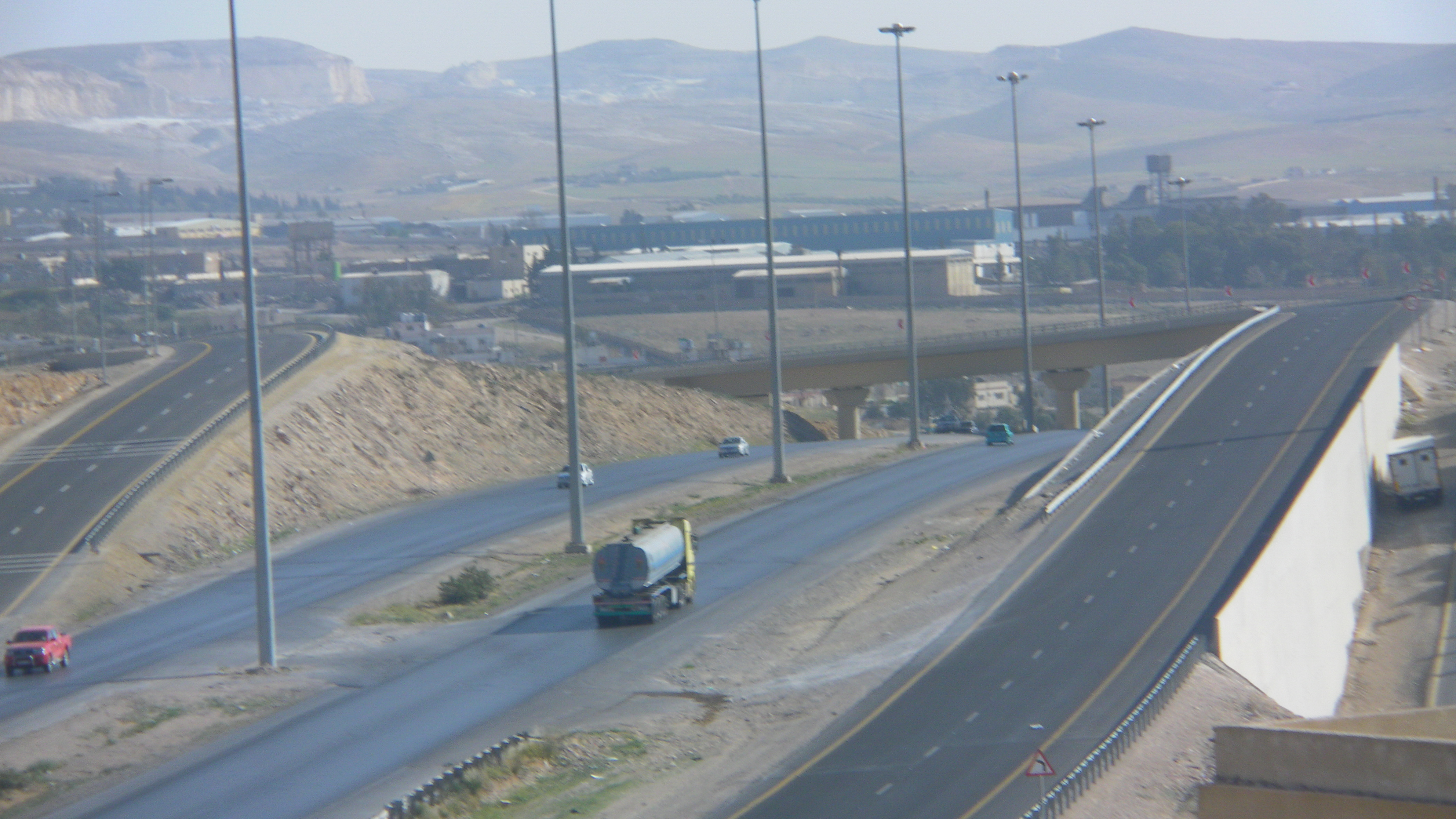 الاوتوستراد الواصل بين عمان والزرقاء. الجهة المعاكسة لإتجاه الصورة يؤدي للمنطقة الحرة. الصورة ملتقطة من جبل طارق، الزرقاء.